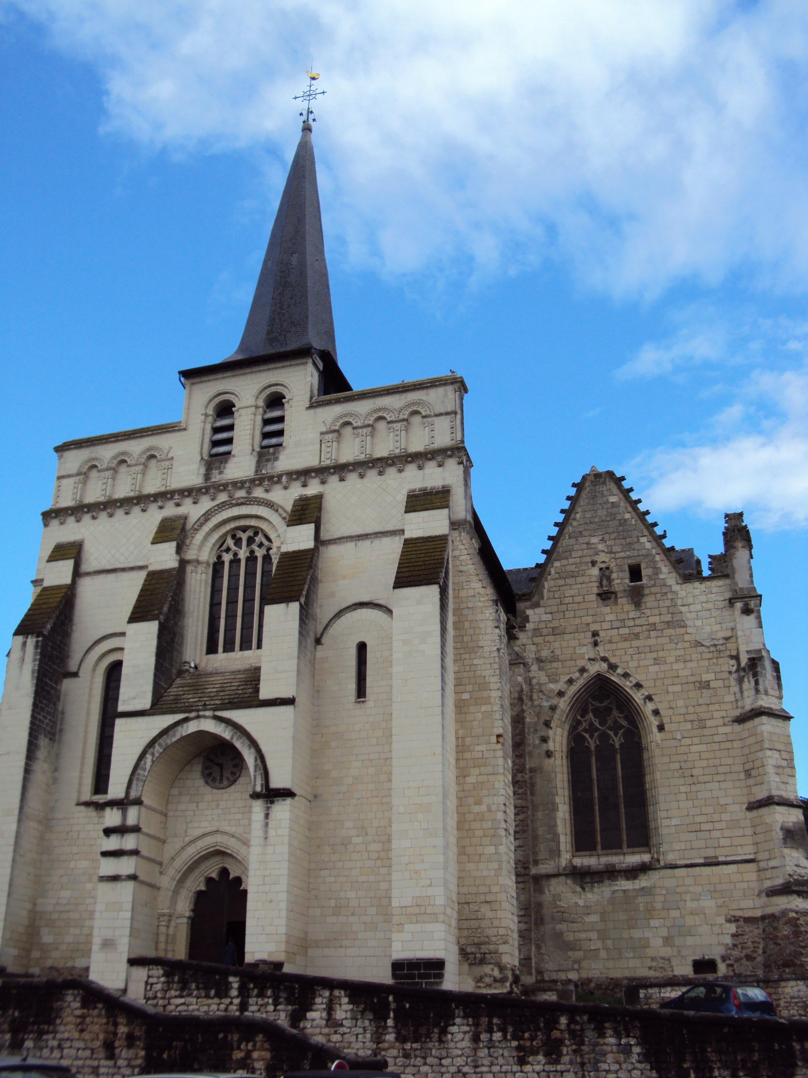 Façade de l'église Notre-Dame-de-Nantilly à Saumur.